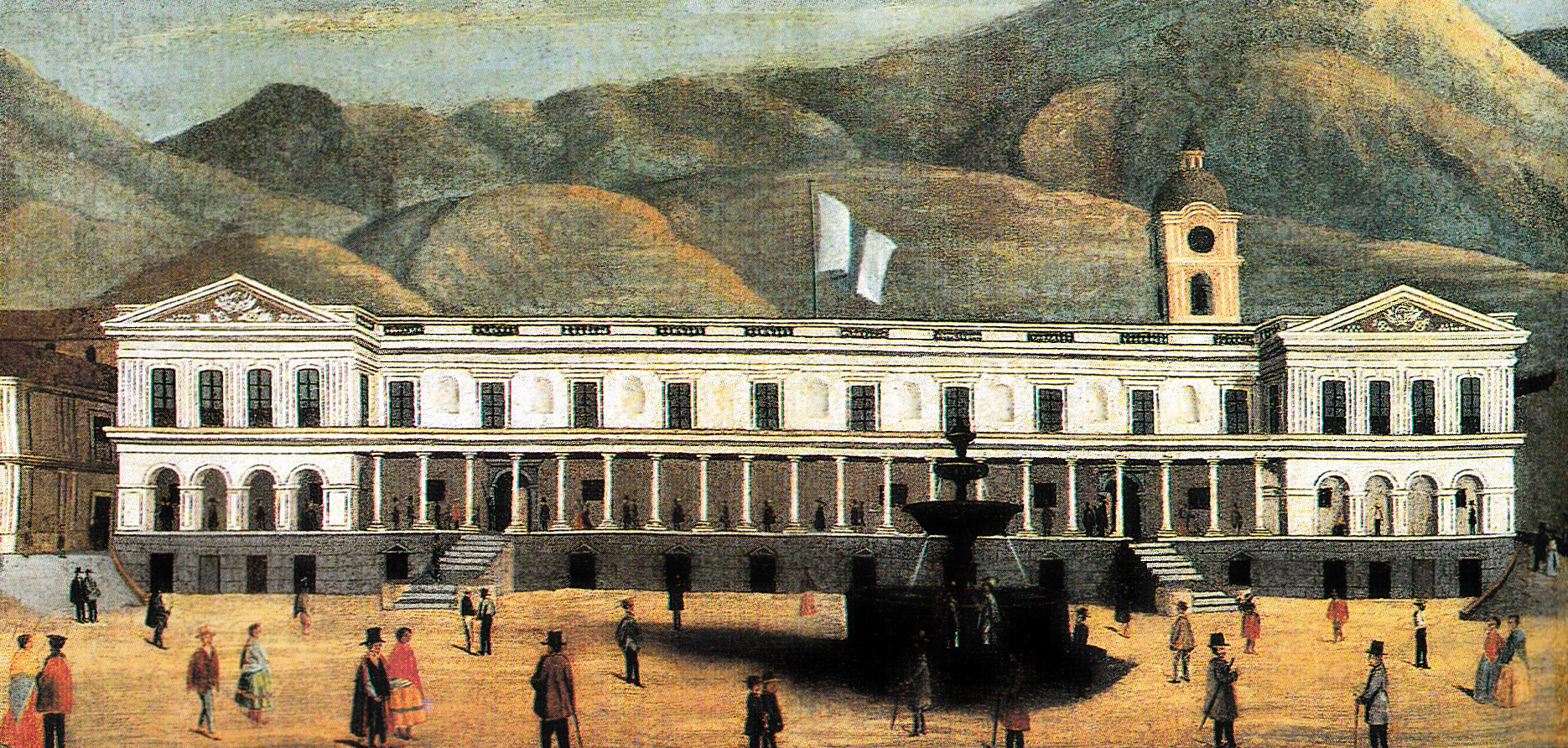 El Palacio de Carondelet, de la ciudad de Quito, a mediados del siglo XIX, después de la Revolución Marcista.